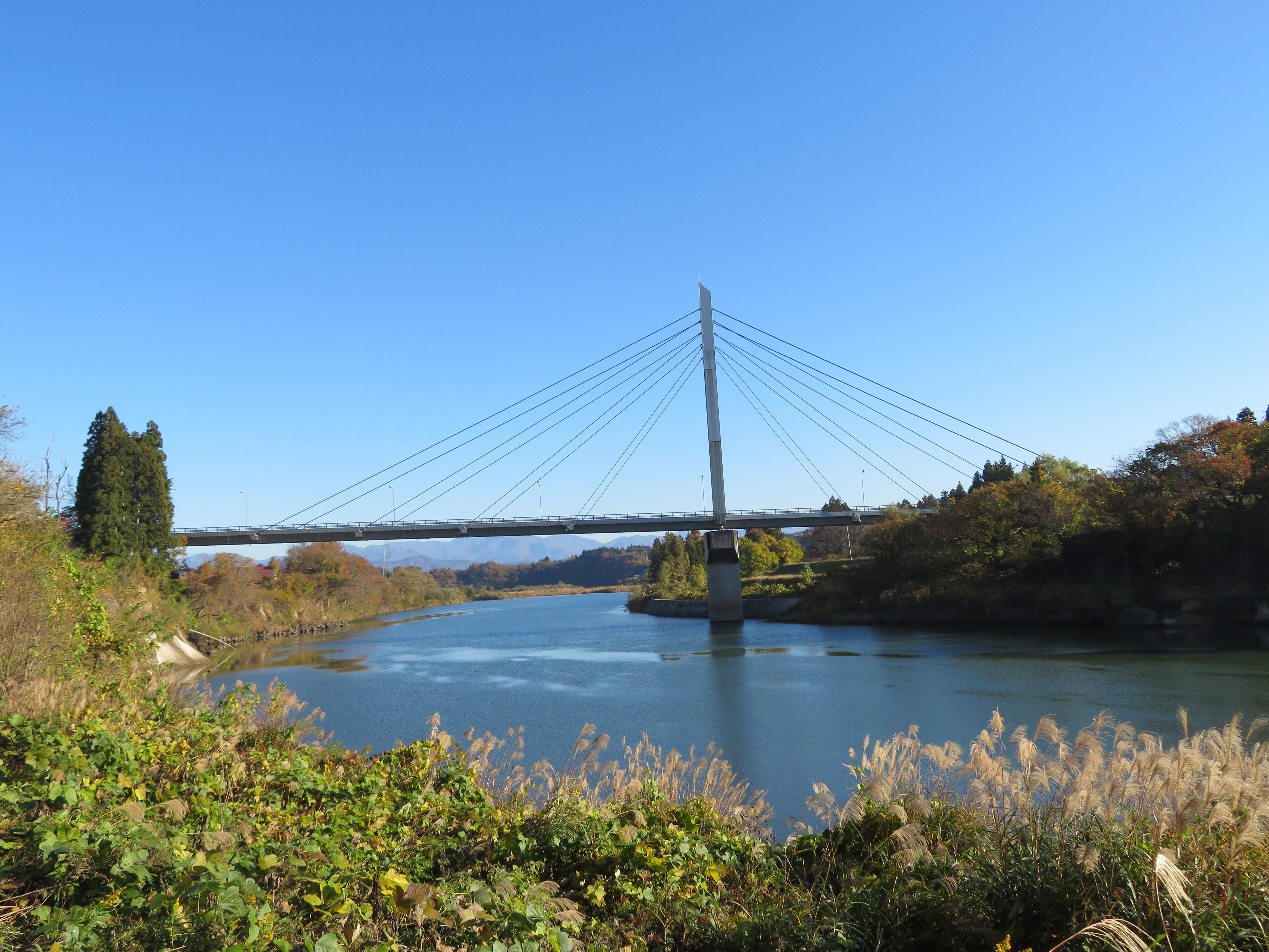 福島県喜多方市の只見川に架かる福島県道340号線西羽賀橋(上流側から撮影） Canon PowerShot SX720 HS